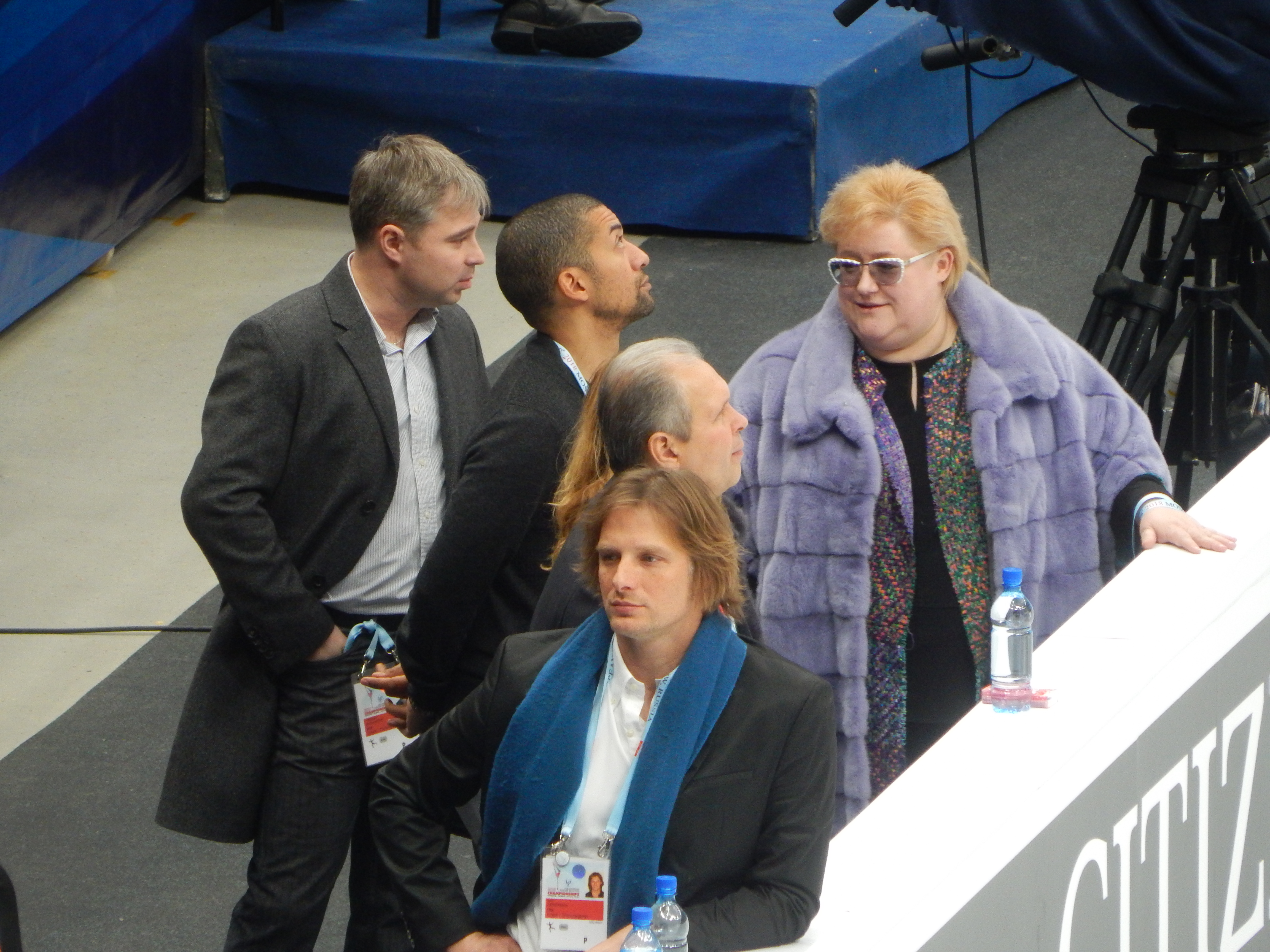 Чемпионат Европы по фигурному катанию 2018 в Москве. Первый день соревнований (17 января). Тренеры у бортика перед началом последней разминки в короткой программе в парном катании